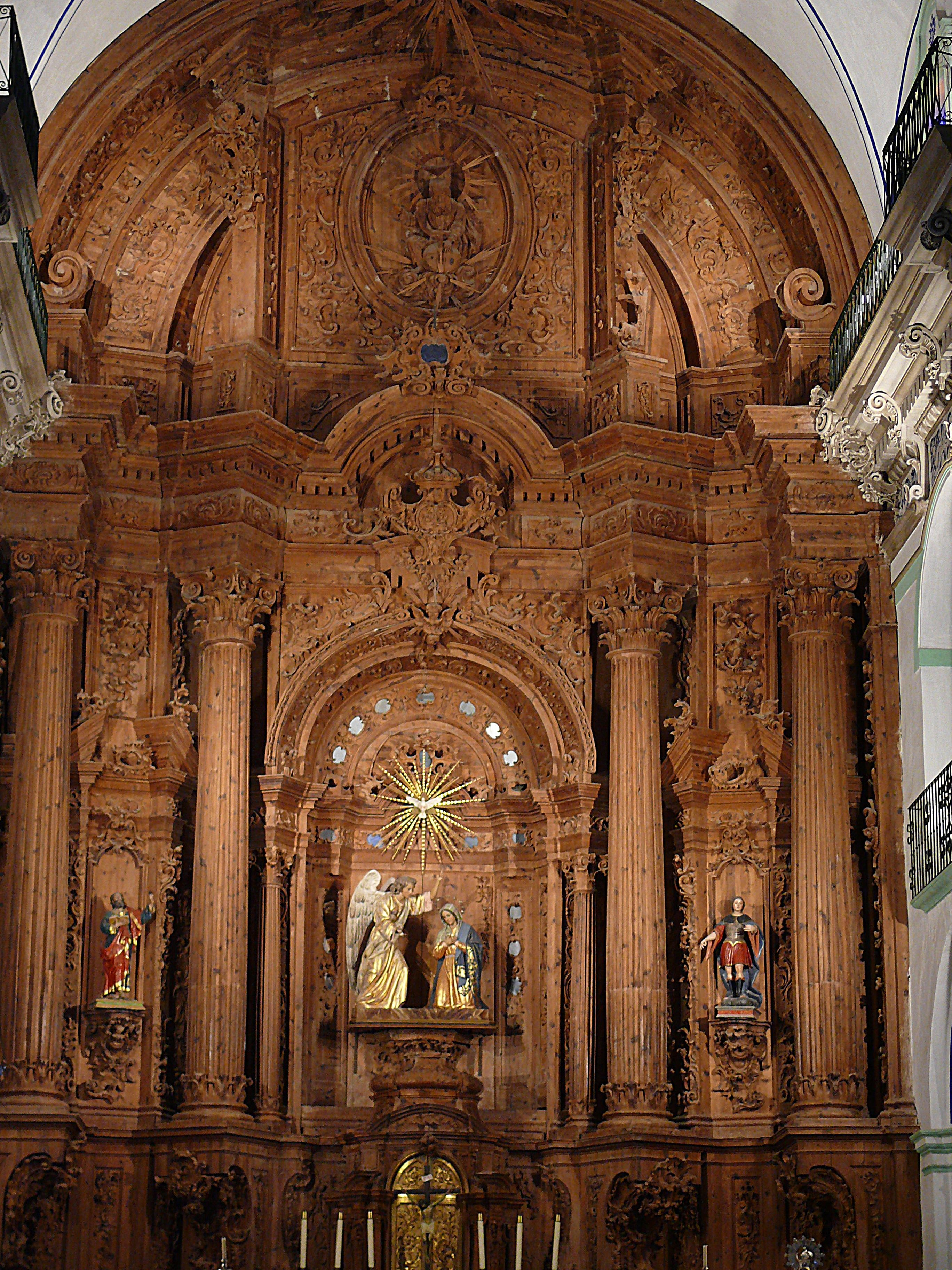 Inneres der Kirche "Nuestra Señora de la Encarnación" von Vélez-Rubio